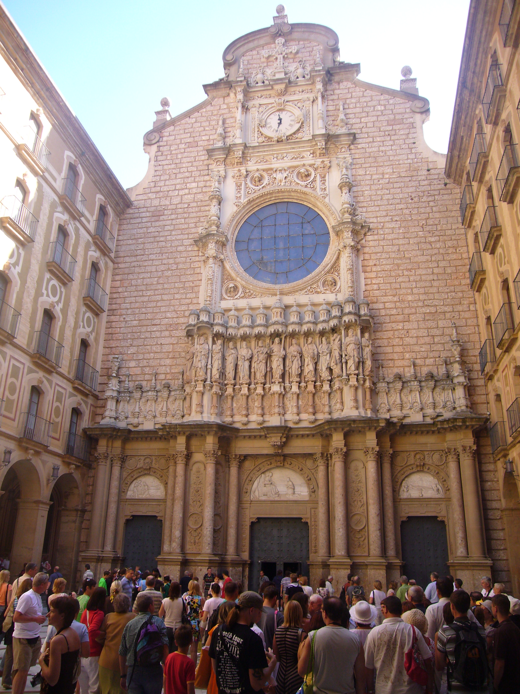 Montserrat, facciata della basilica